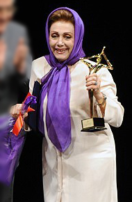 افلیا پرتو - اختتامیه دوازدهمین جشن خانه موسیقی ۱۳۹۰/۷/۲۱